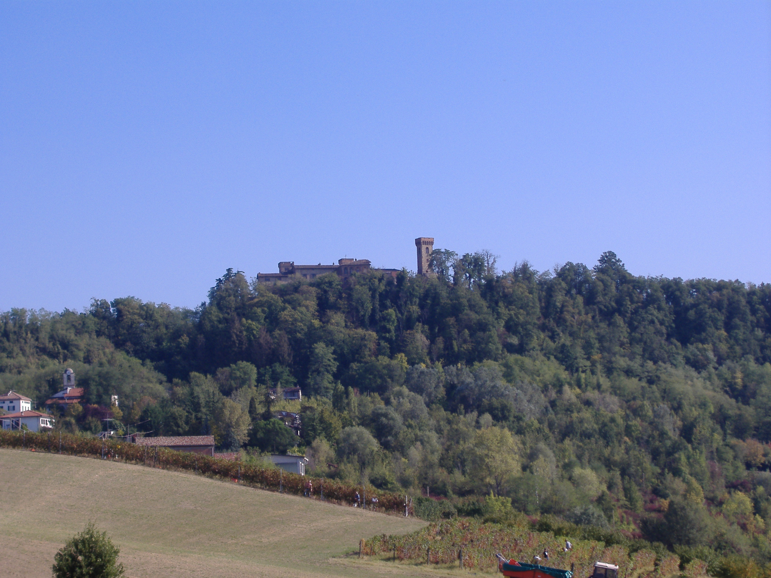 Il castello di Pozzol Groppo visto dal cimitero